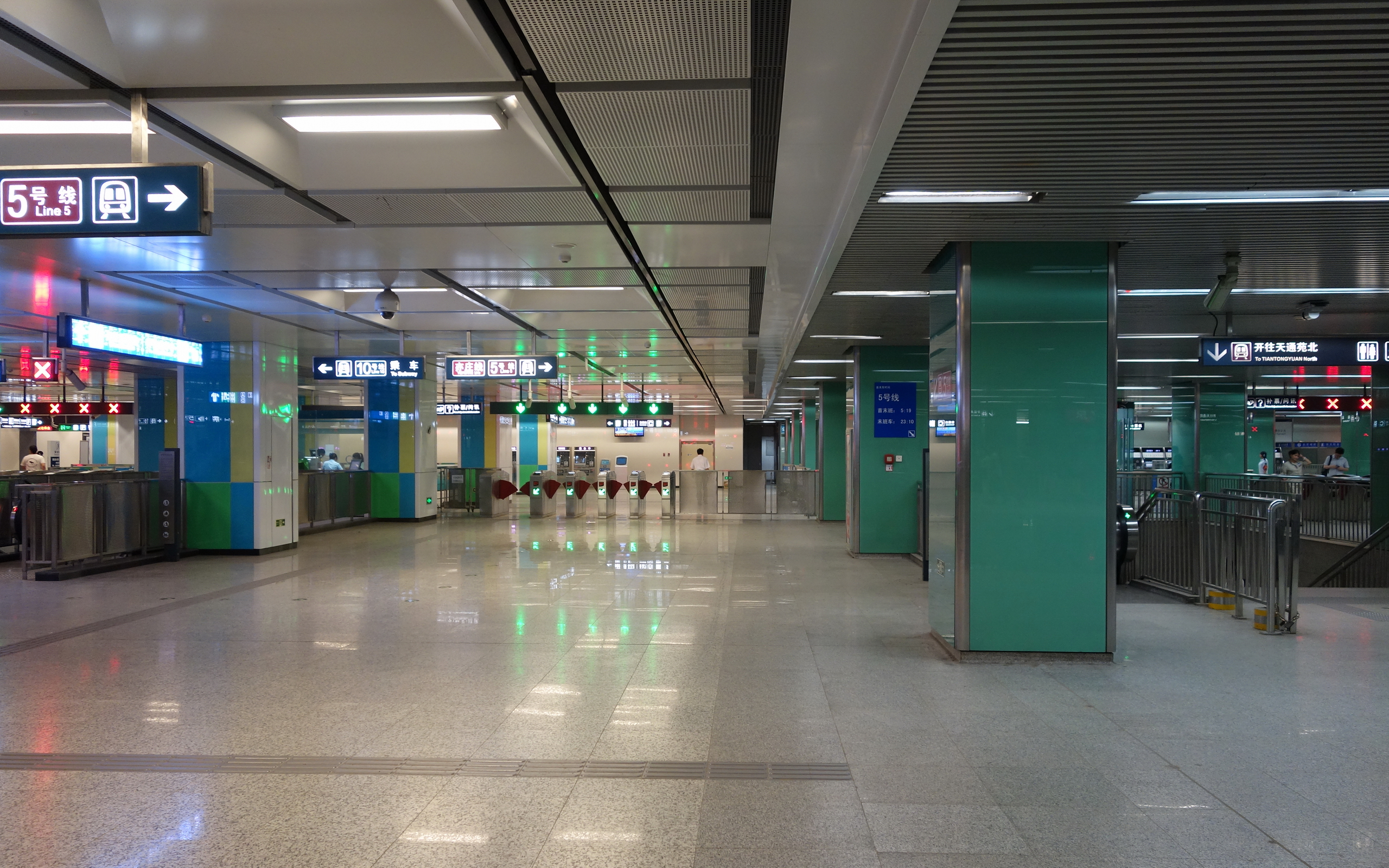 宋家庄站站厅层